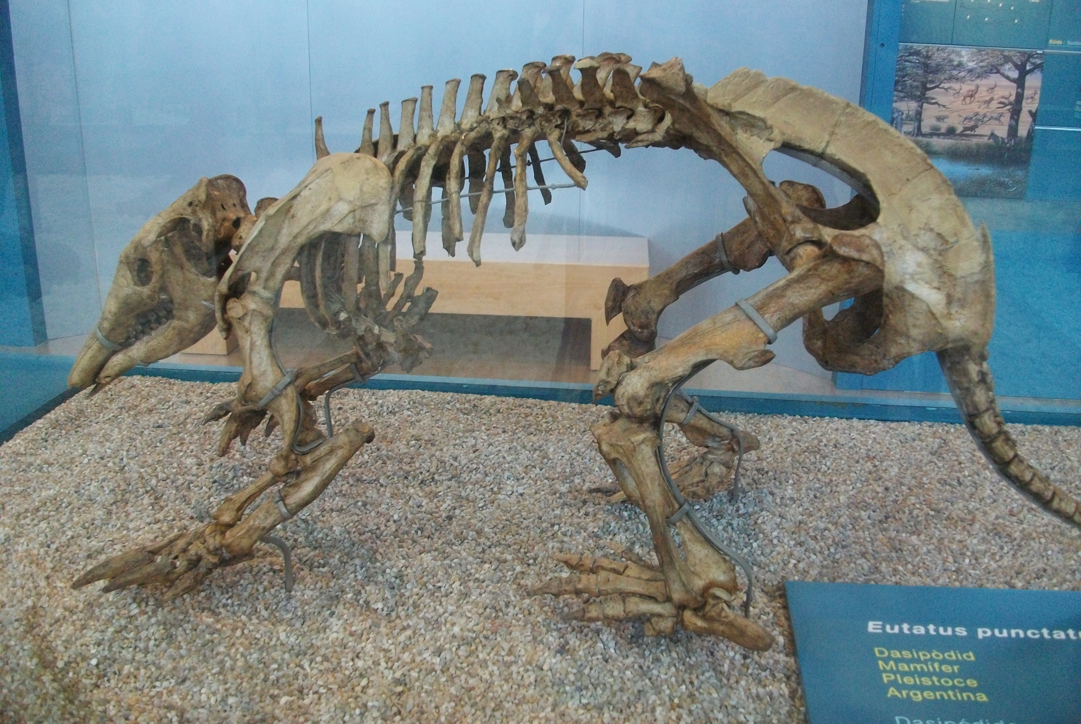 Eutatus punctatus, dasipòdid, Museu de Ciències Naturals de València.